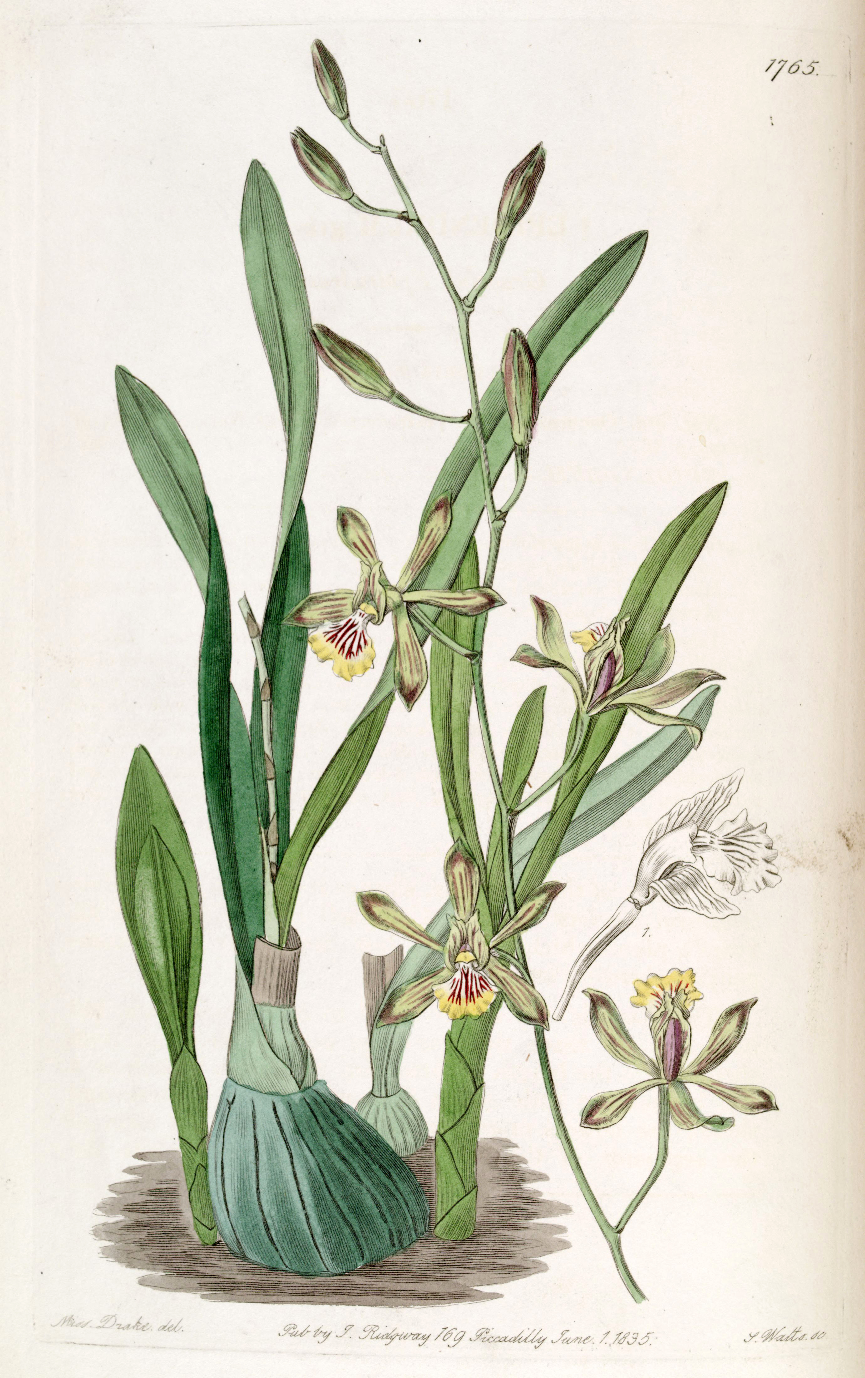 Encyclia gracilis (as syn. Epidendrum gracile)